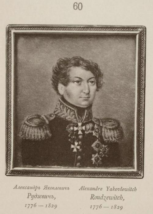 Aleksandr Iakovlevich Rudzevich, 1776-1829